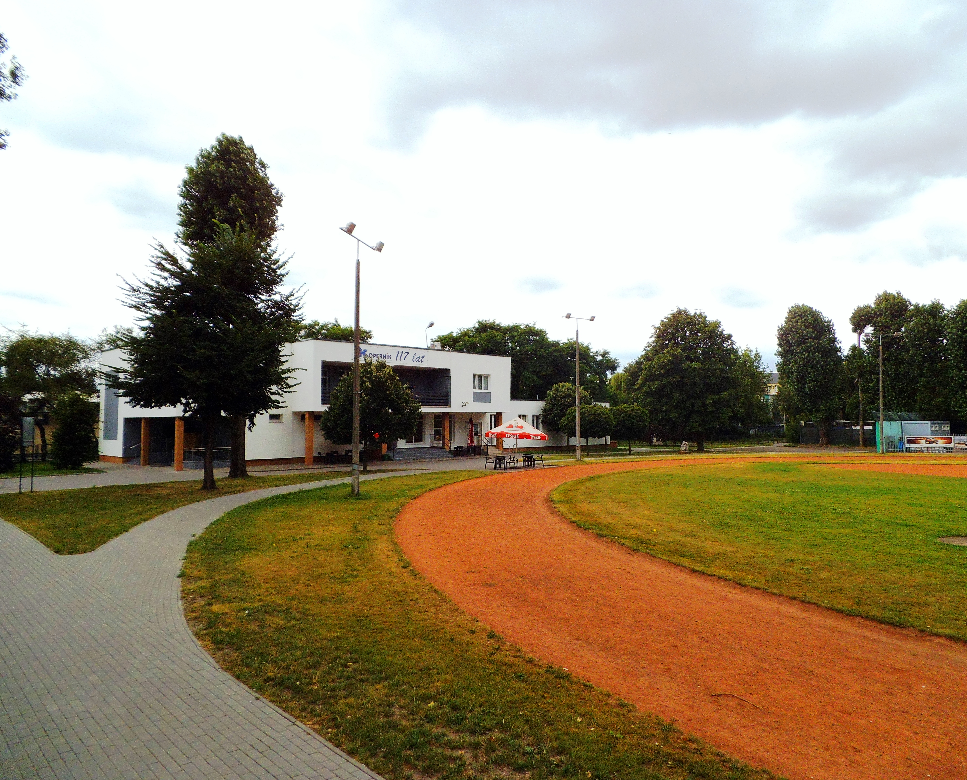 Ośrodek Sportowy im. Teodora Długokińskiego w Toruniu1